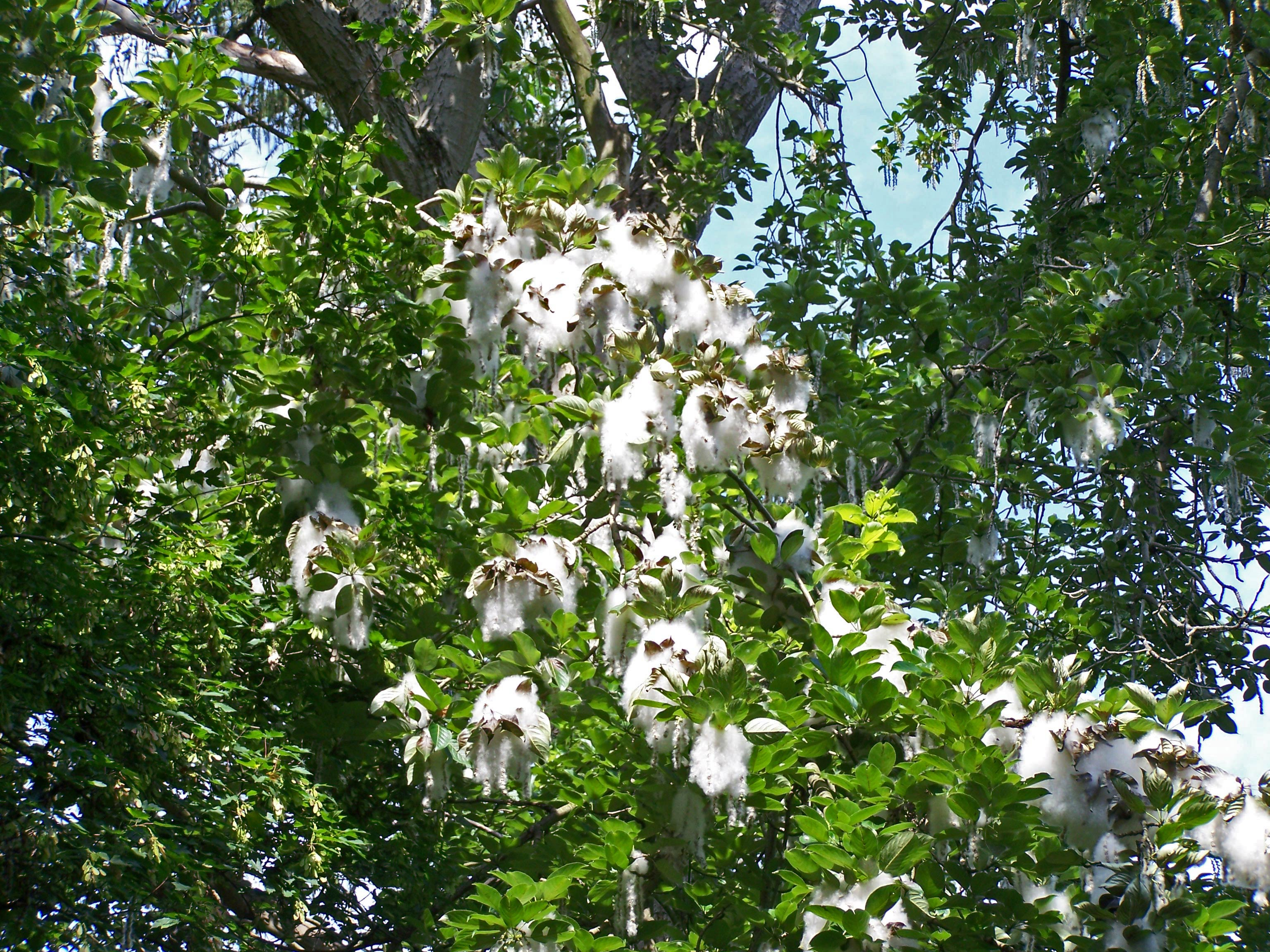 Populus-maximowiczii Pappel, Botanischer Garten Berlin